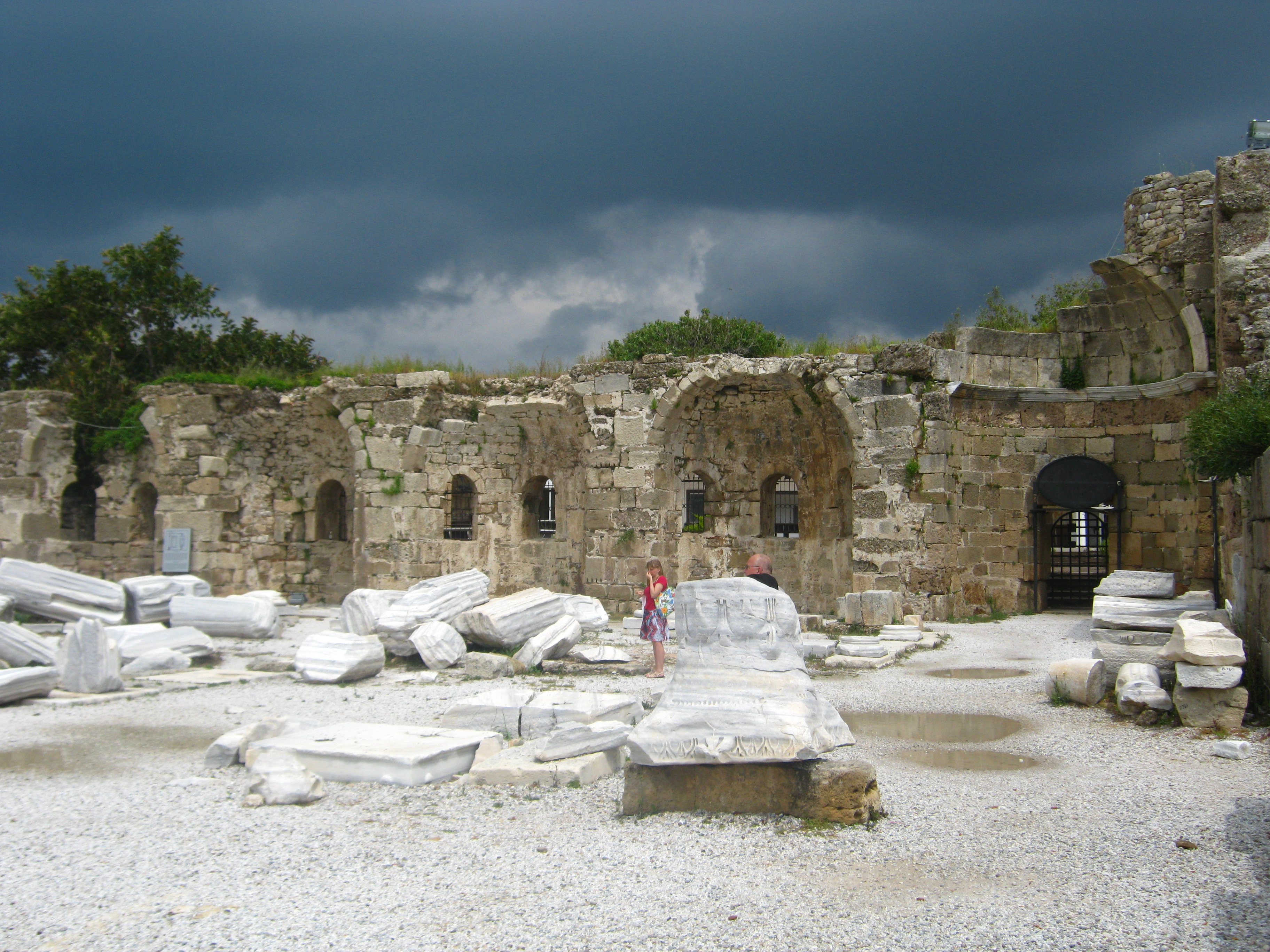 атріум південної базиліки